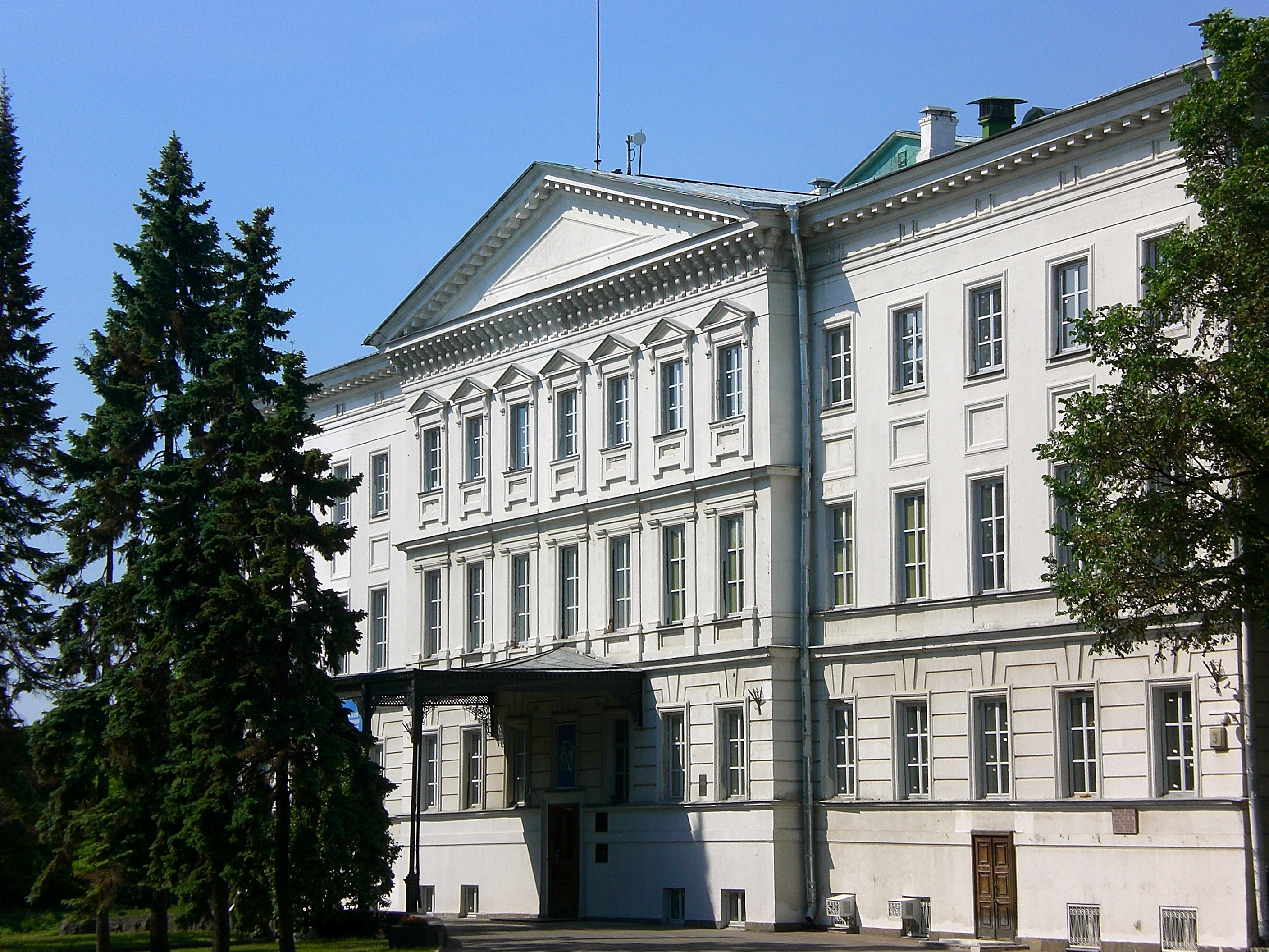 Дом Губернатора (Нижегородская область, Нижний Новгород, Кремль, Минина и Пожарского площадь, корпус 3)